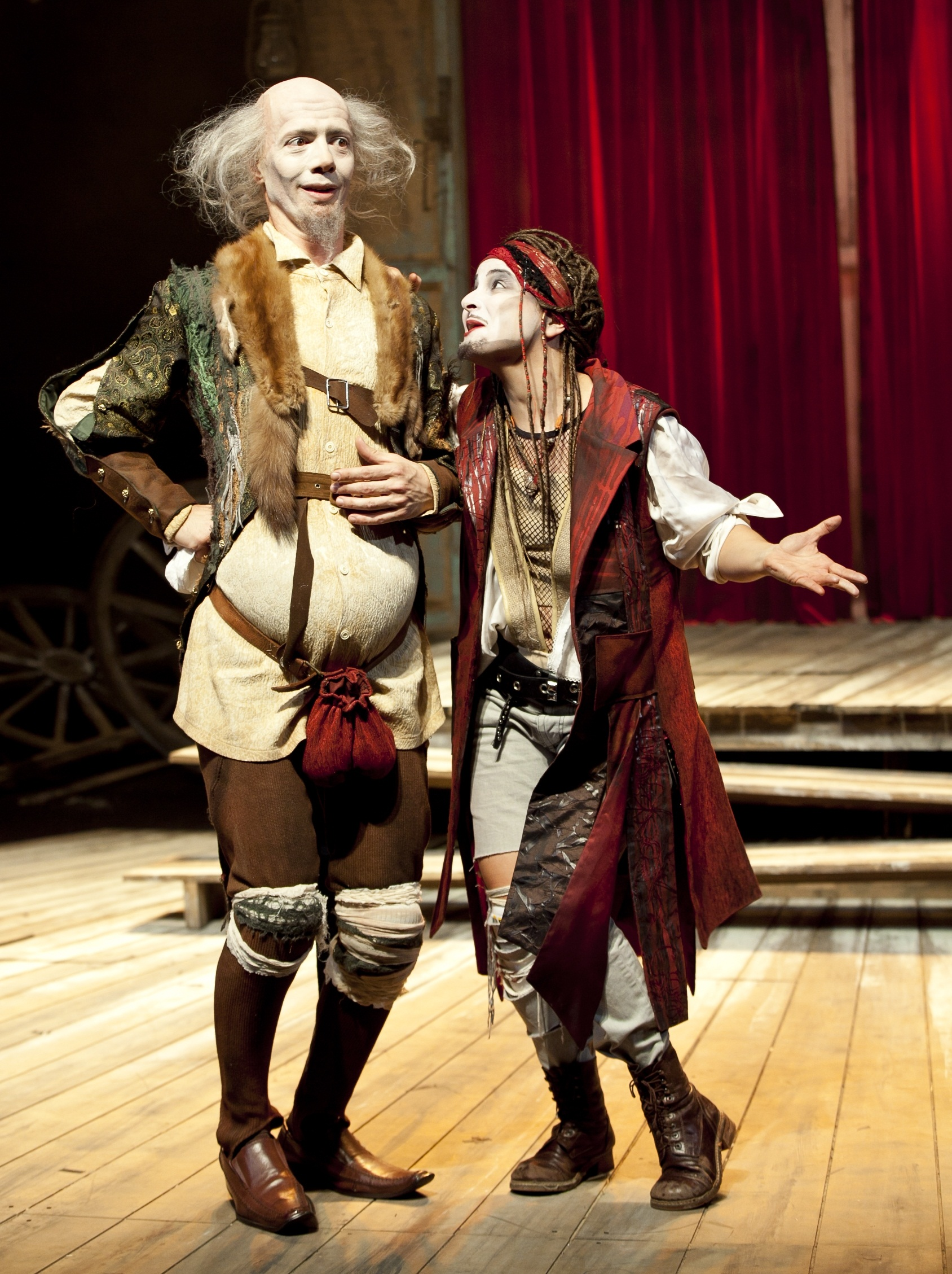 ההצגה מנדראגולה, בבימויו של גלעד קמחי, עיצוב תלבושות של אולה שבצוב, עיצוב תפאורה ערן עצמון, עיצוב תאורה קרן גרנק, תיאטרון בית ליסין, 2011